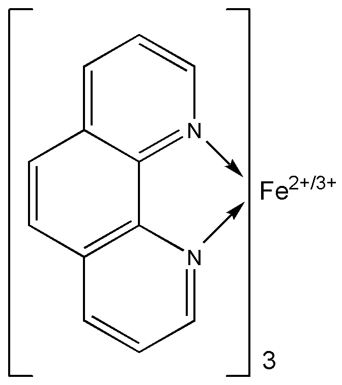 Ferroin. Erstellt von Ba10r.